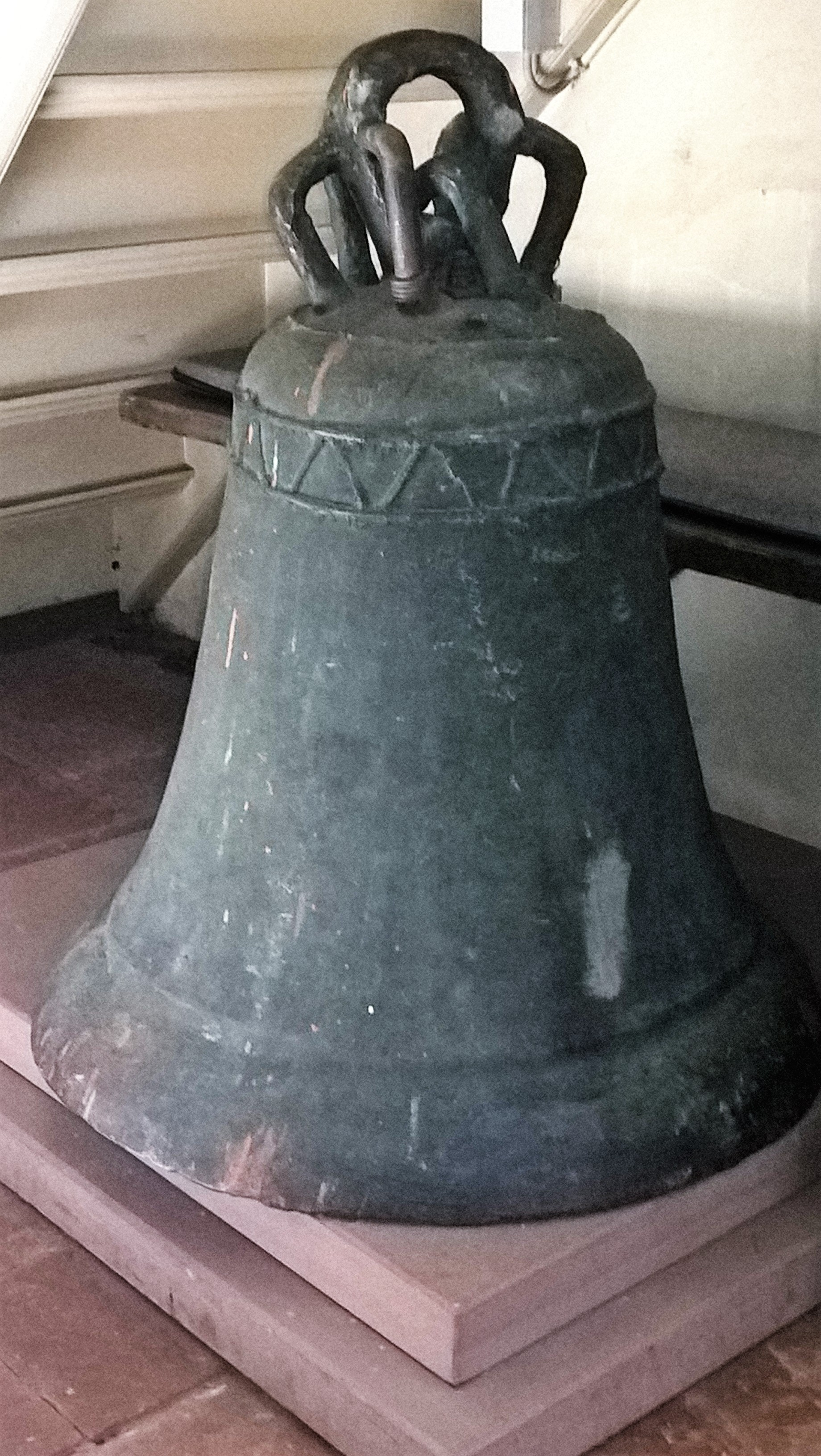 Evangelische Kirche Römershausen (Gladenbach), Landkreis Marburg-Biedenkopf, Hessen, Deutschland